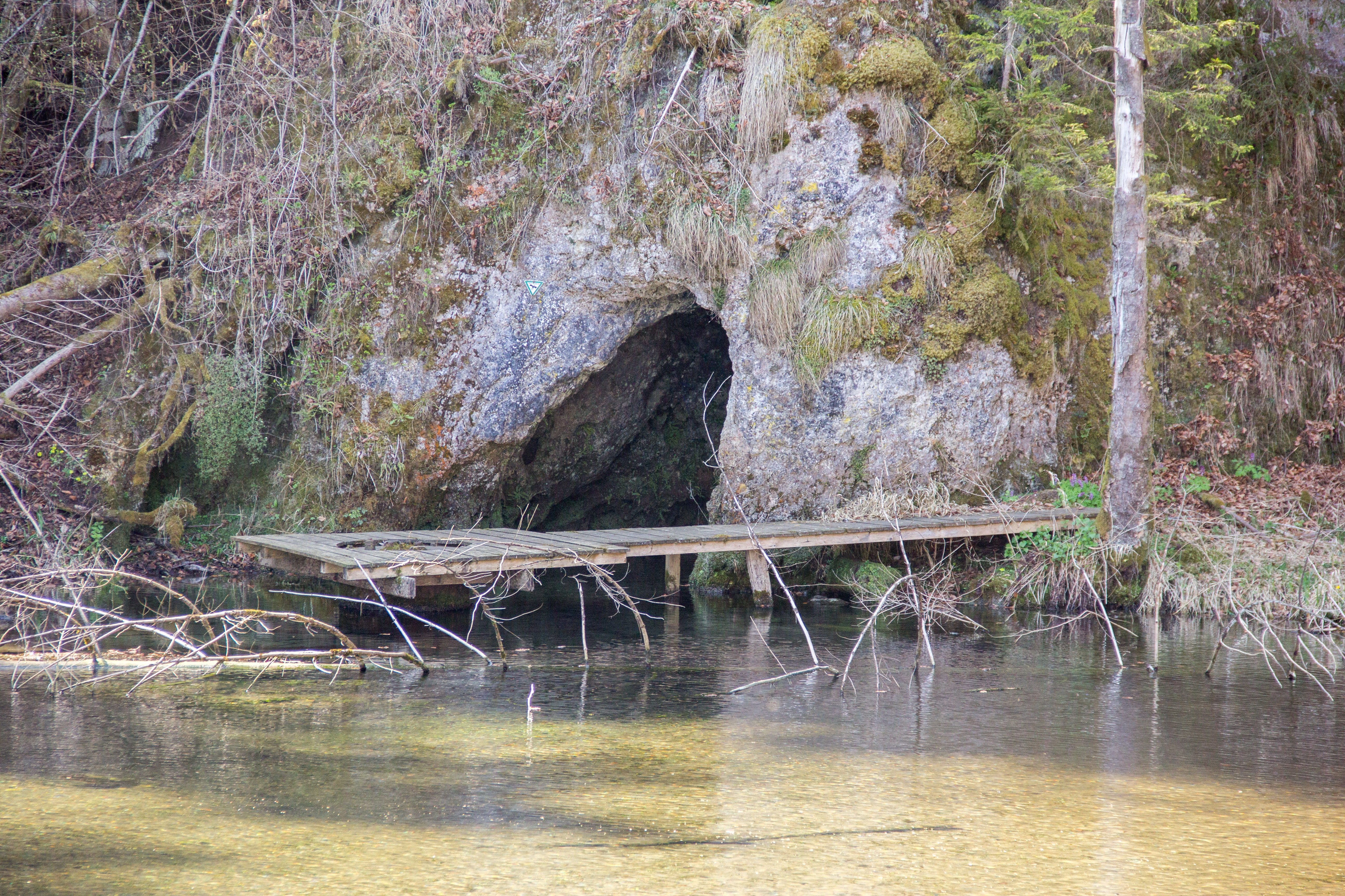 Seeweiher mit Grotte, NSG Pegnitzau zwischen Ranna und Michelfeld, Geotop